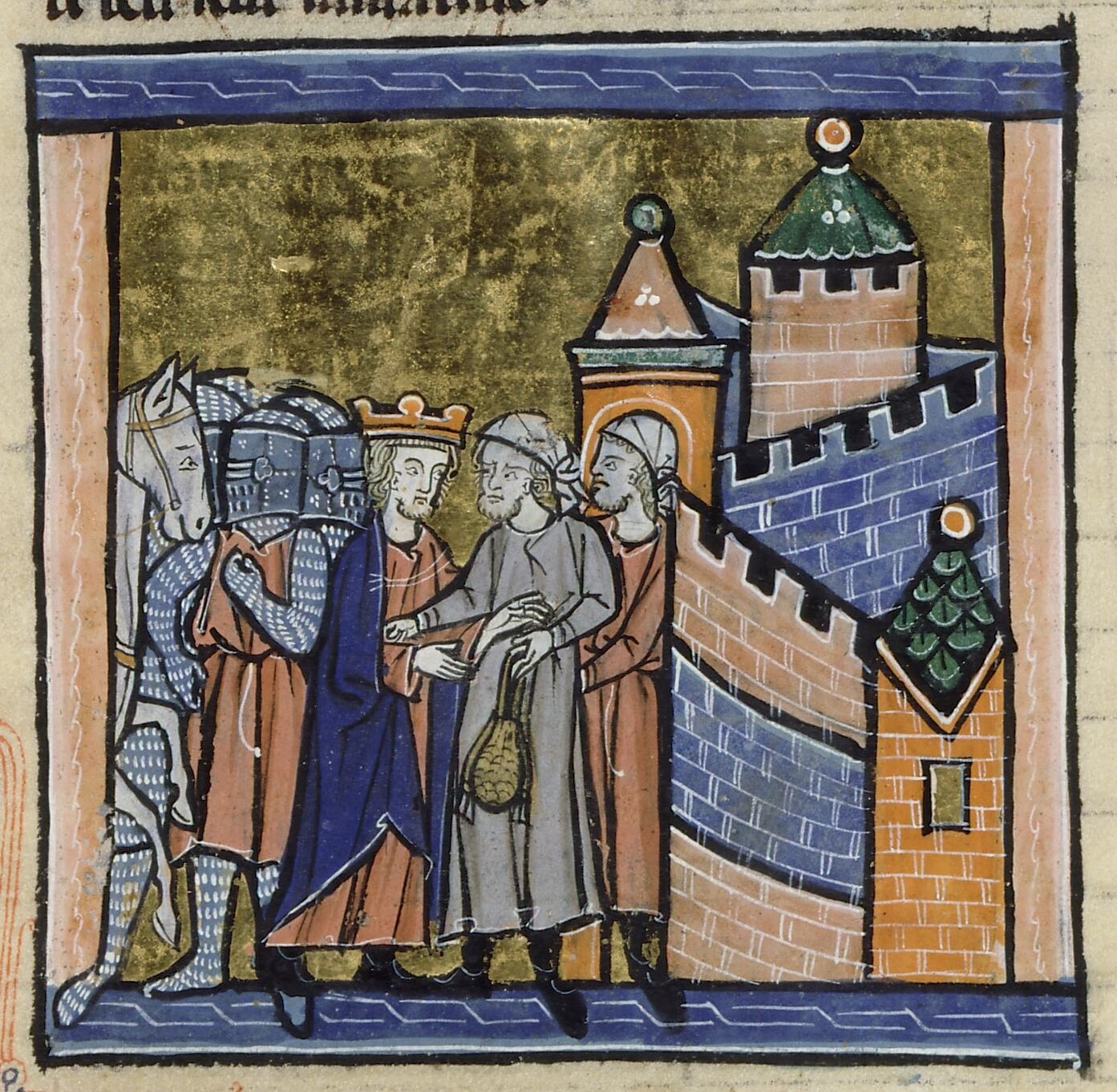 Négociations devant Shaizar (1138)